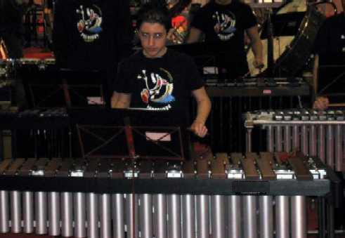 Instrumento de láminas de madera preferentemente de palosanto. Se monta en bastidor y el sonido se modula mediante los tubos instalados en la parte inferior.